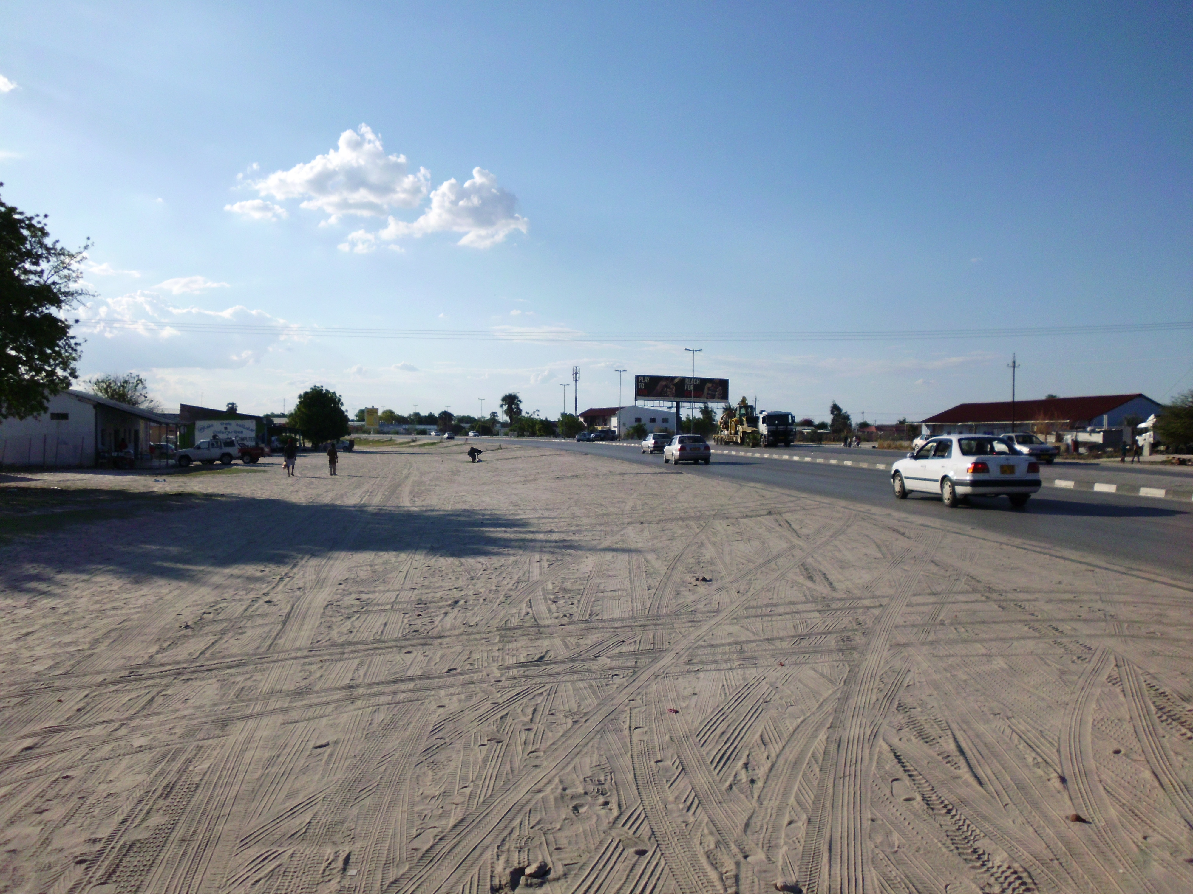 Hauptstrasse von Ondangwa mit Blick Richtung Oshakati.